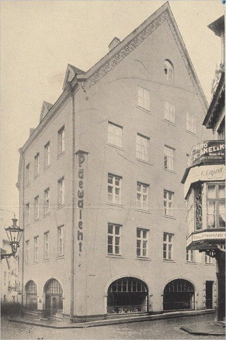 Газетный дом на углу улицы Пикк и Ратаскаэву в Таллине